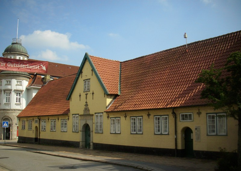 Præsidentkloster i Slesvig